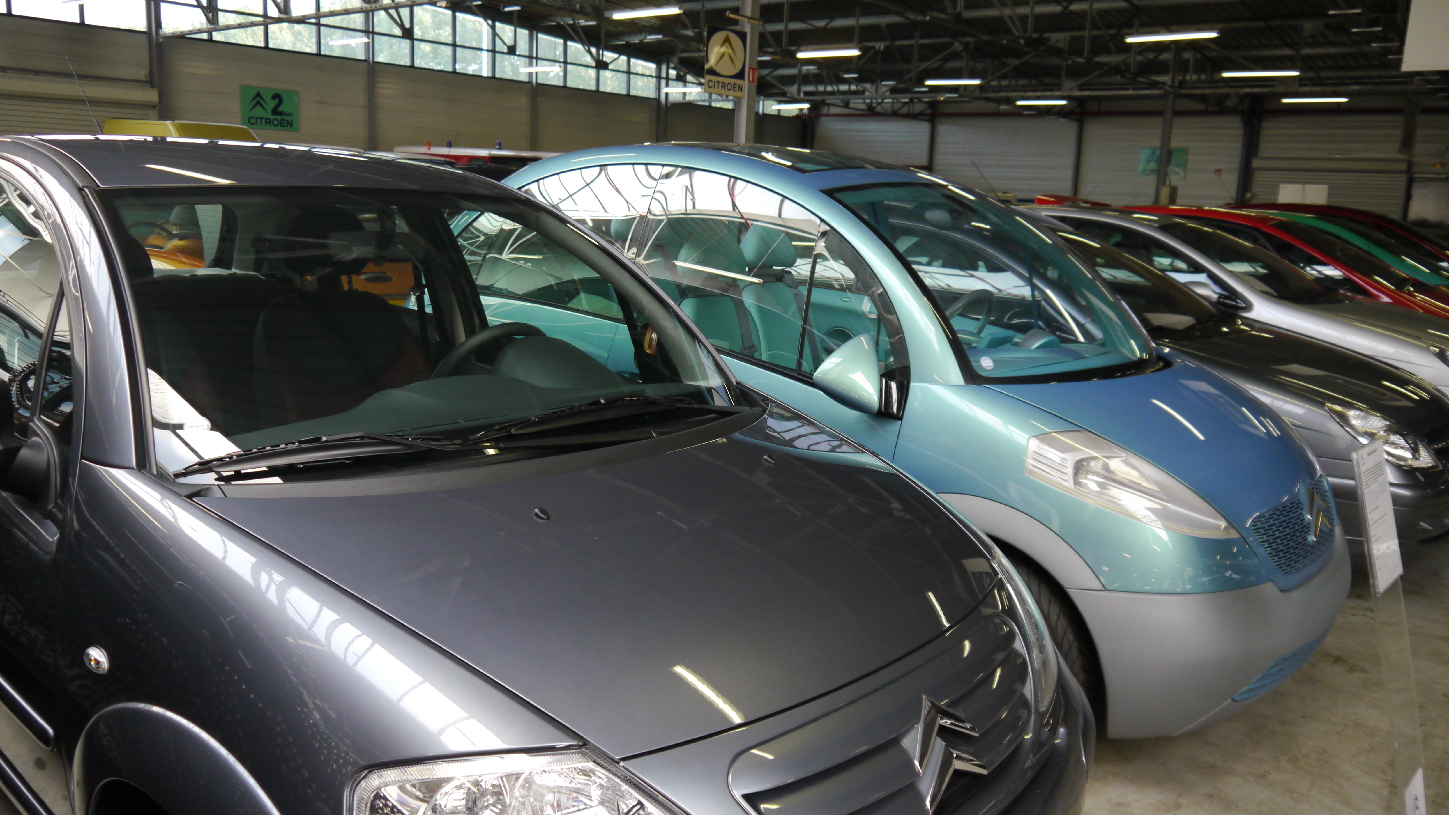 Conservatoire Citroen 246 Citroen Lumiere